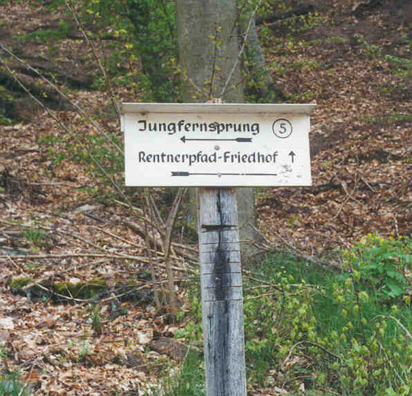 Hinweisschild in Dahn own work, Alma